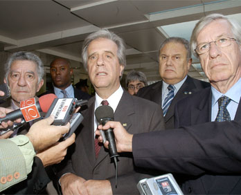 Políticos de Uruguay, Reinaldo Gargano, Tabaré Vazquez, Jorge Lepra y Danilo Astori.